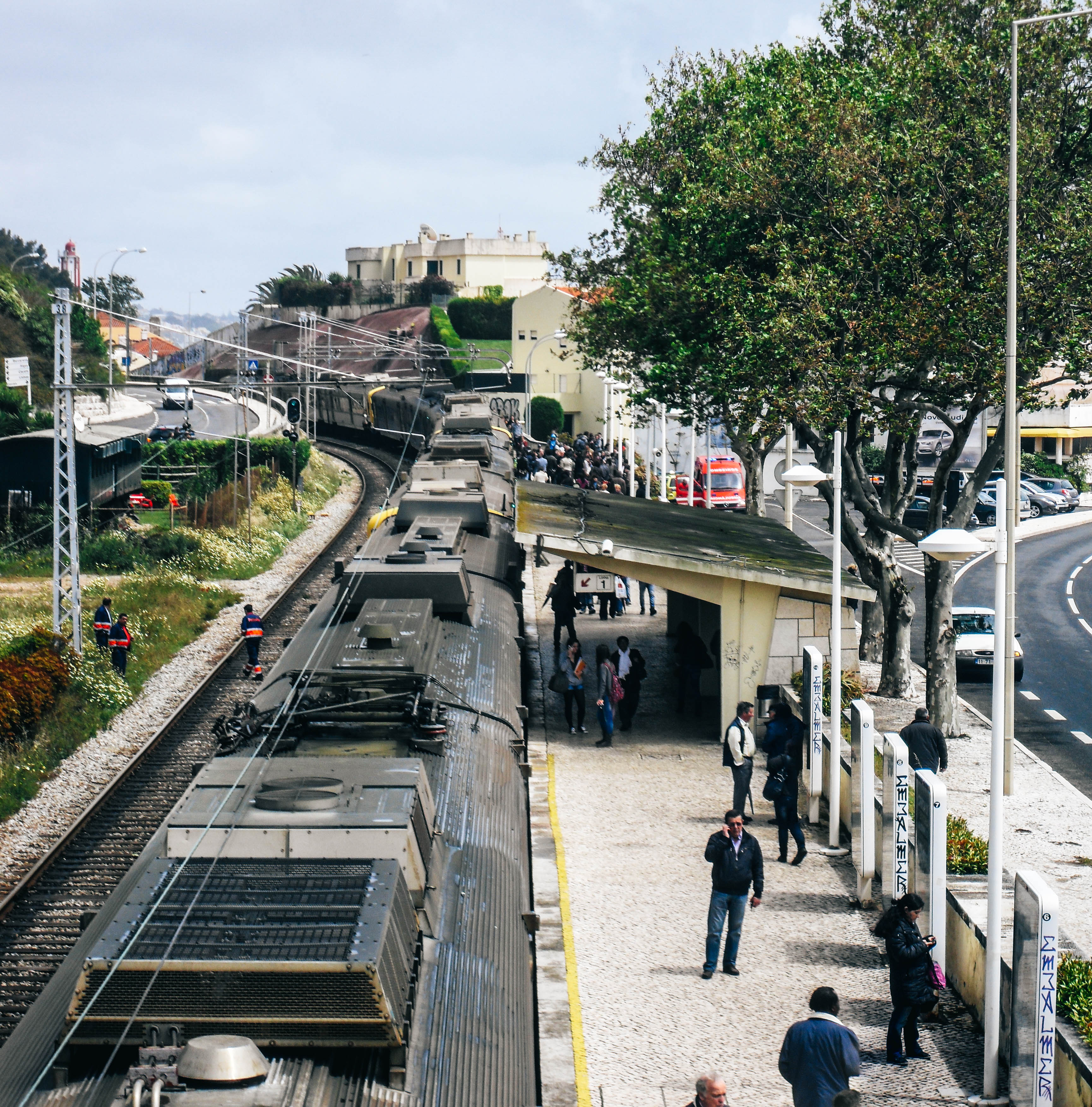 Acidente ferroviário de Caxias, a 2 de maio de 2012. Visão geral das unidades acidentadas. Em primeiro plano, a UQE+UTE do serviço Cais do Sodré–Oeiras.